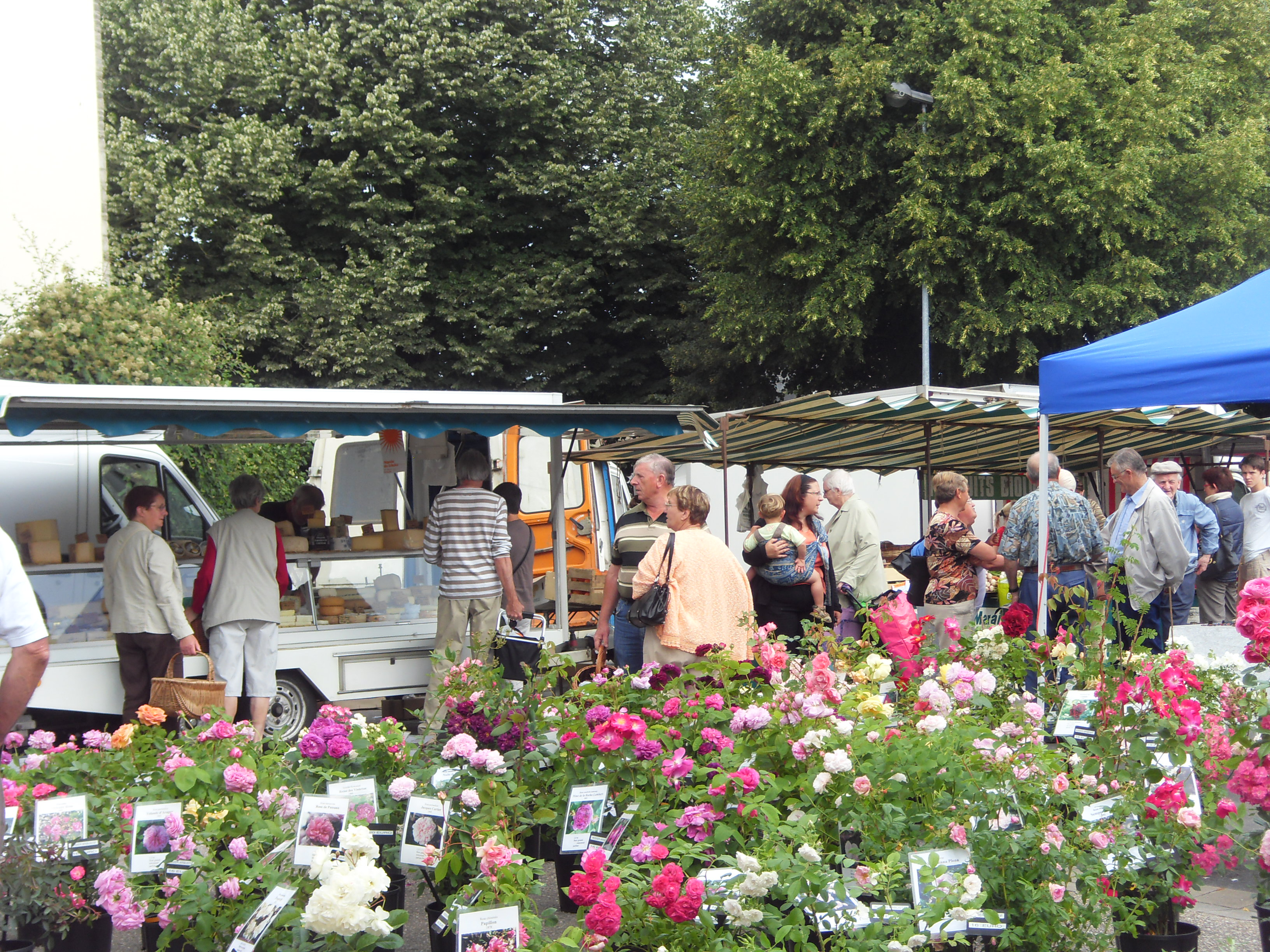 Marché à Ploërmel (Morbihan, France)